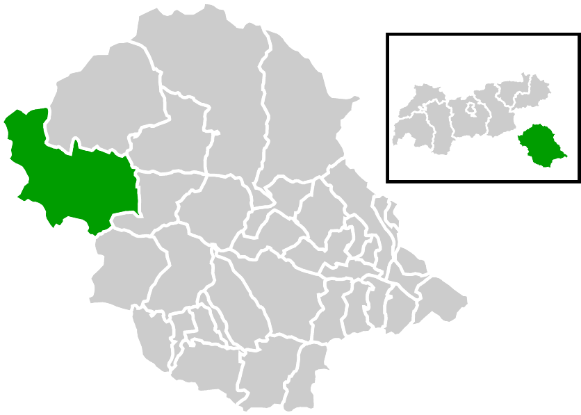 Lage der Gemeinde innerhalb des Bezirks Lienz